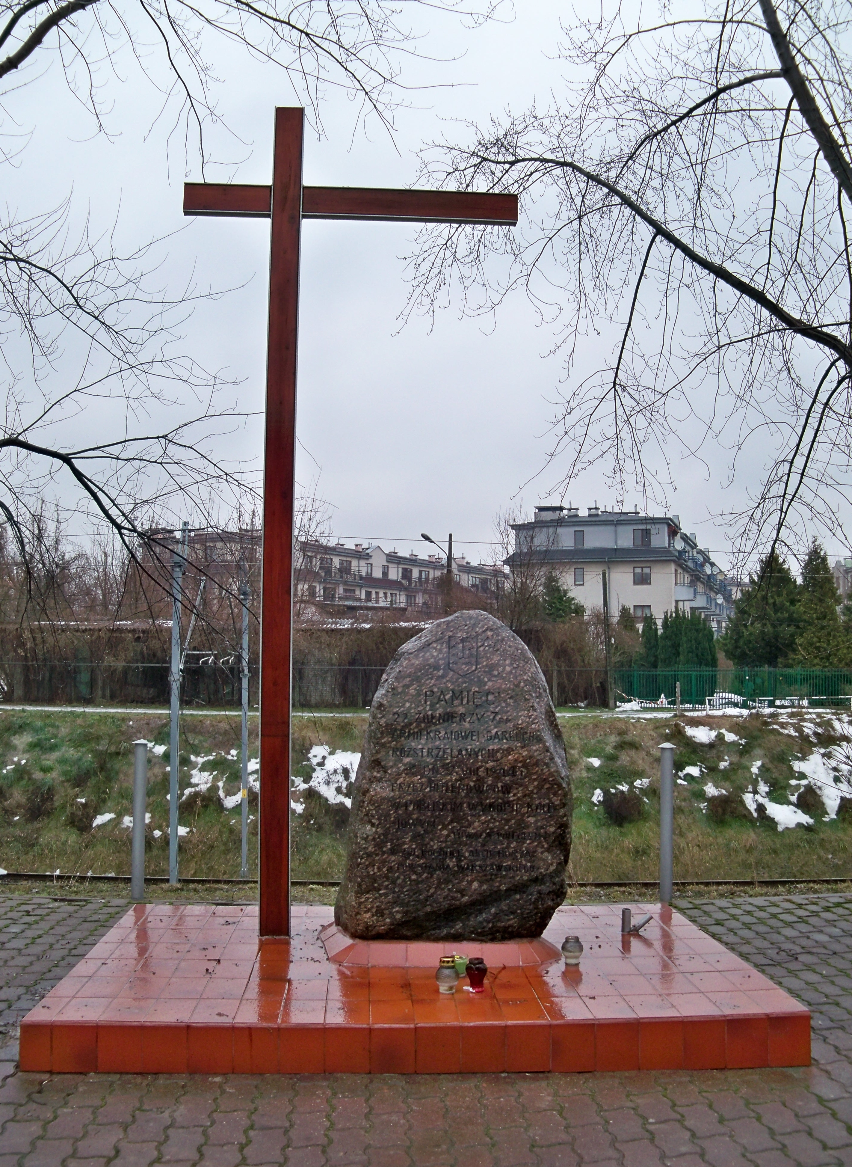 Głaz ”Pamięci 22 żołnierzy 7 pp Armii Krajowej ”Garłuch” rozstrzelanych dn. 2 VIII 1944 przez hitlerowców w pobliskim wykopie kolejowym”. Odsłonięty 22.10.1994. Ul. Instalatorów w Warszawie. W tle wykop kolei radomskiej i osiedle Szczęśliwice.